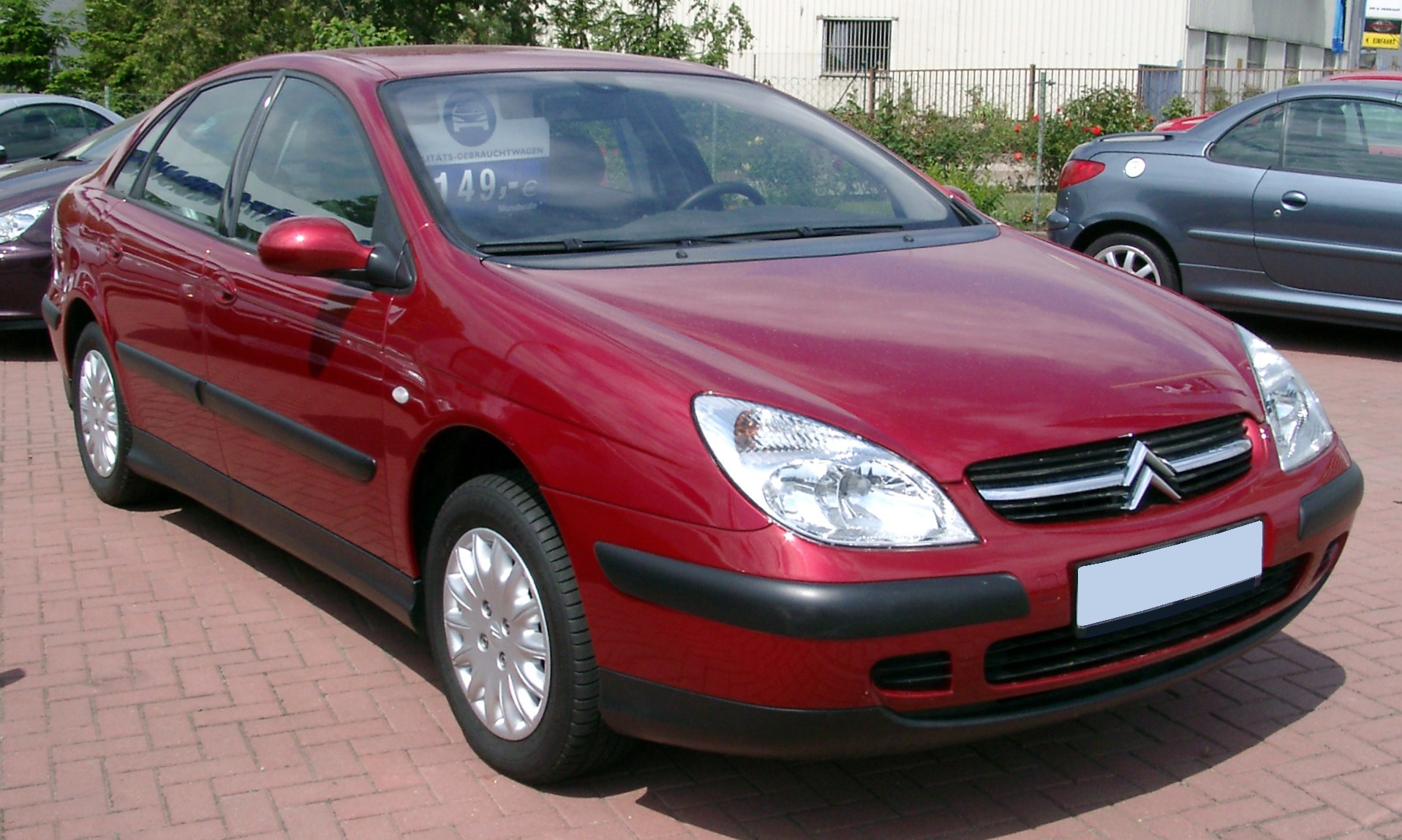 Citroen C5